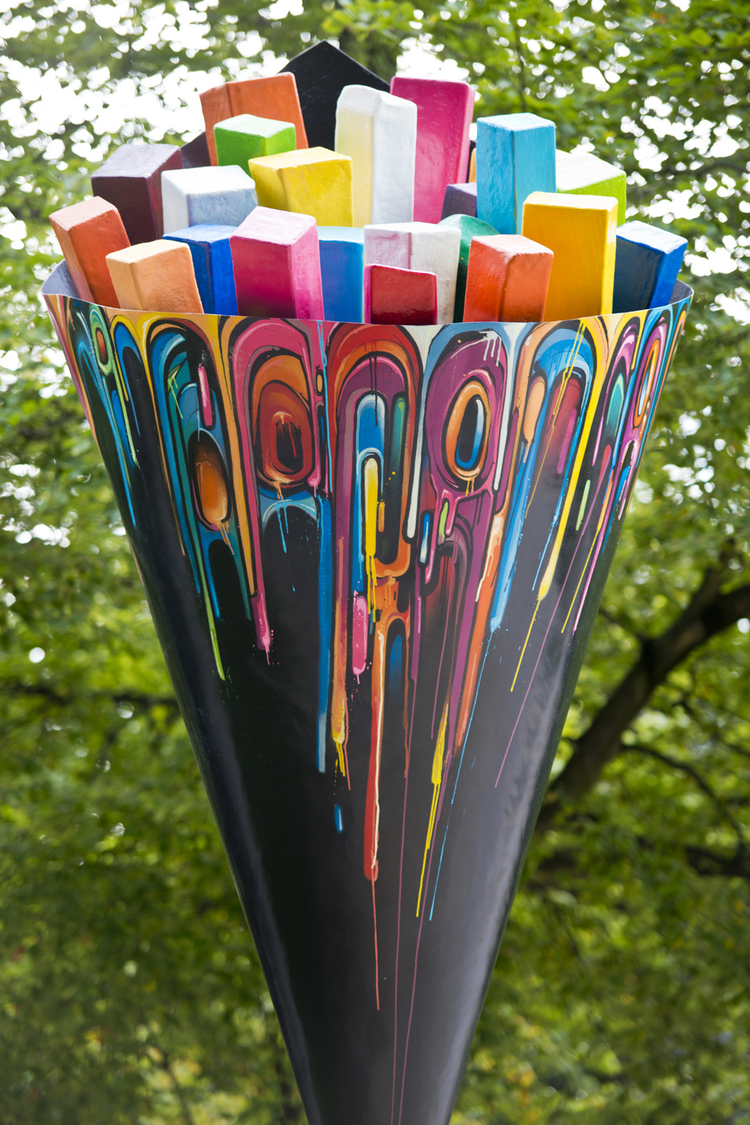 Funky fries